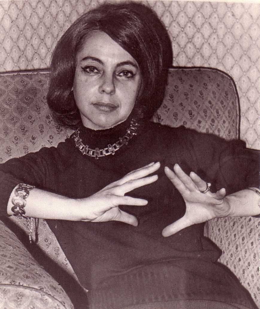 Aurora de Albornoz in Madrid, mid 1970's.